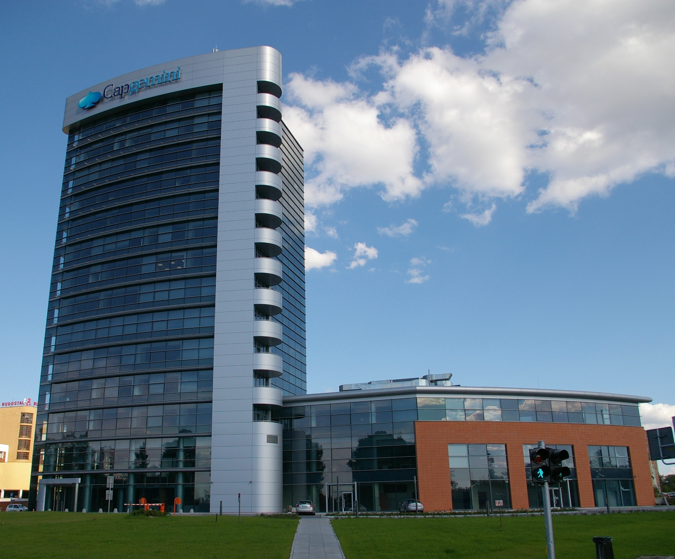 Wieżowiec Rondo Business Park w Krakowie